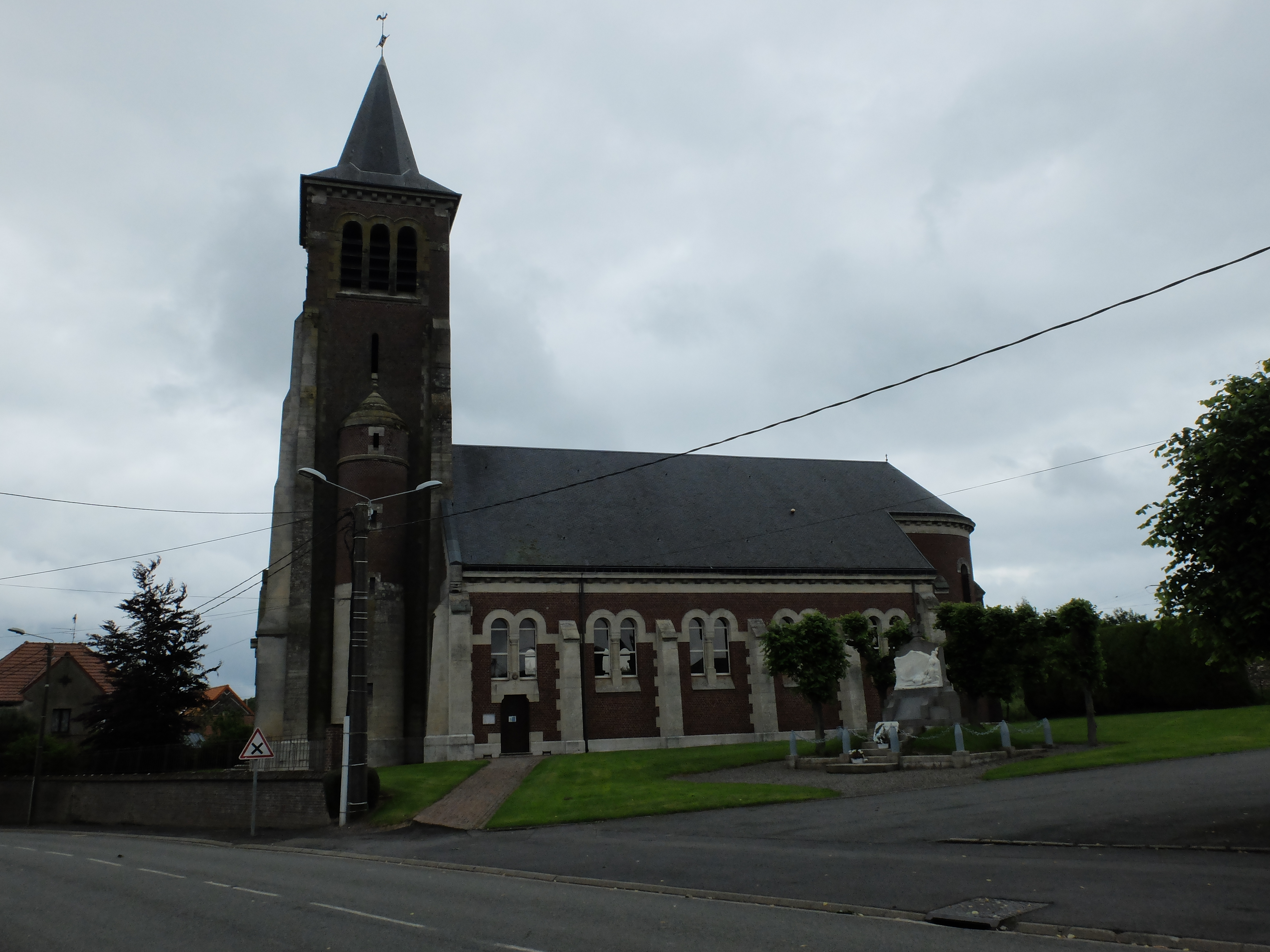 Vue de l'église et du monument aux morts de Lagnicourt-Marcel.